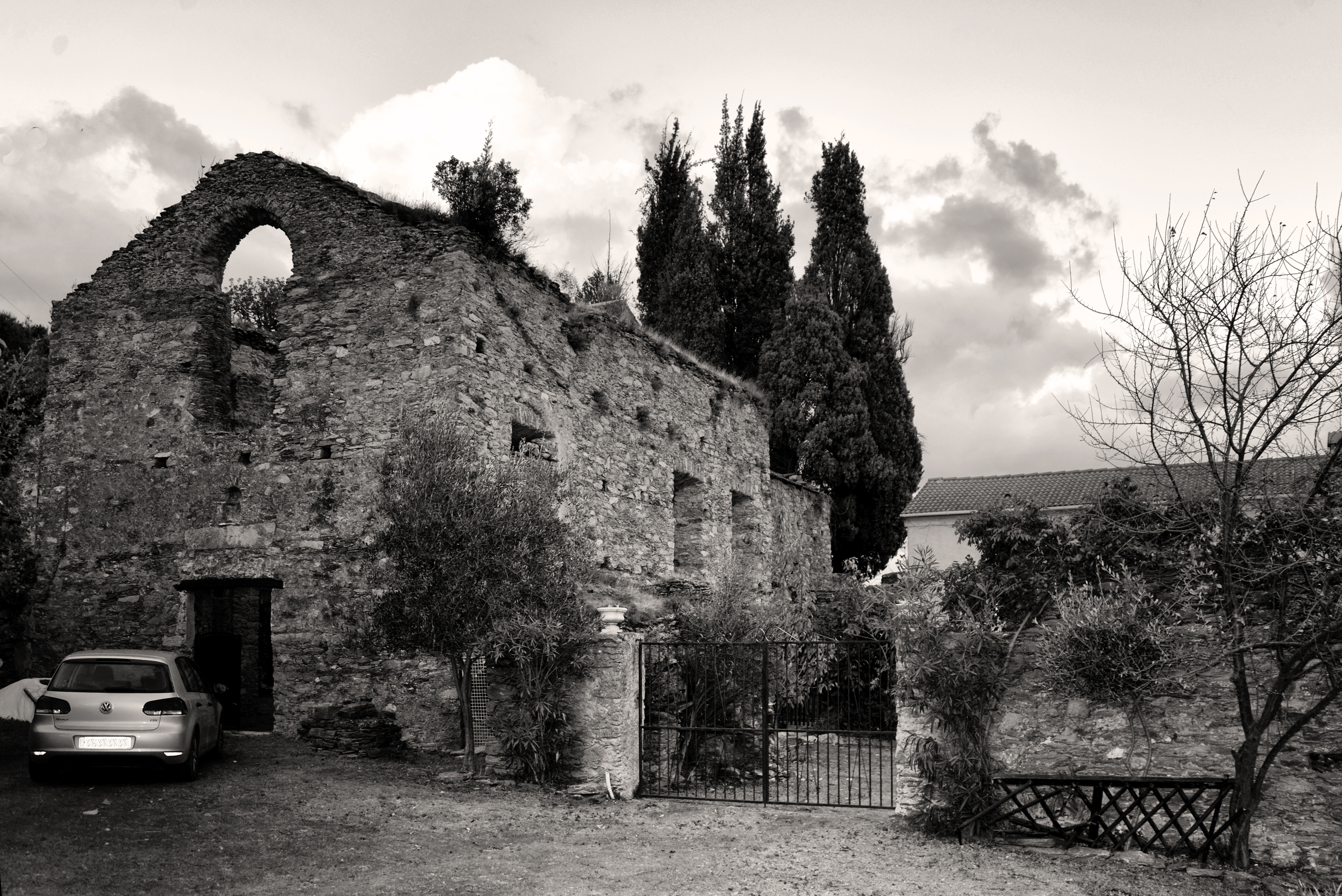 Linguizzetta, Plaine Orientale (Corse) - L'ancien couvent de Verde. Théodore Ier (Théodore de Neuhoff) roi de Corse, s'y installa quelques jours en 1736, durant la grande révolte des Corses contre Gènes